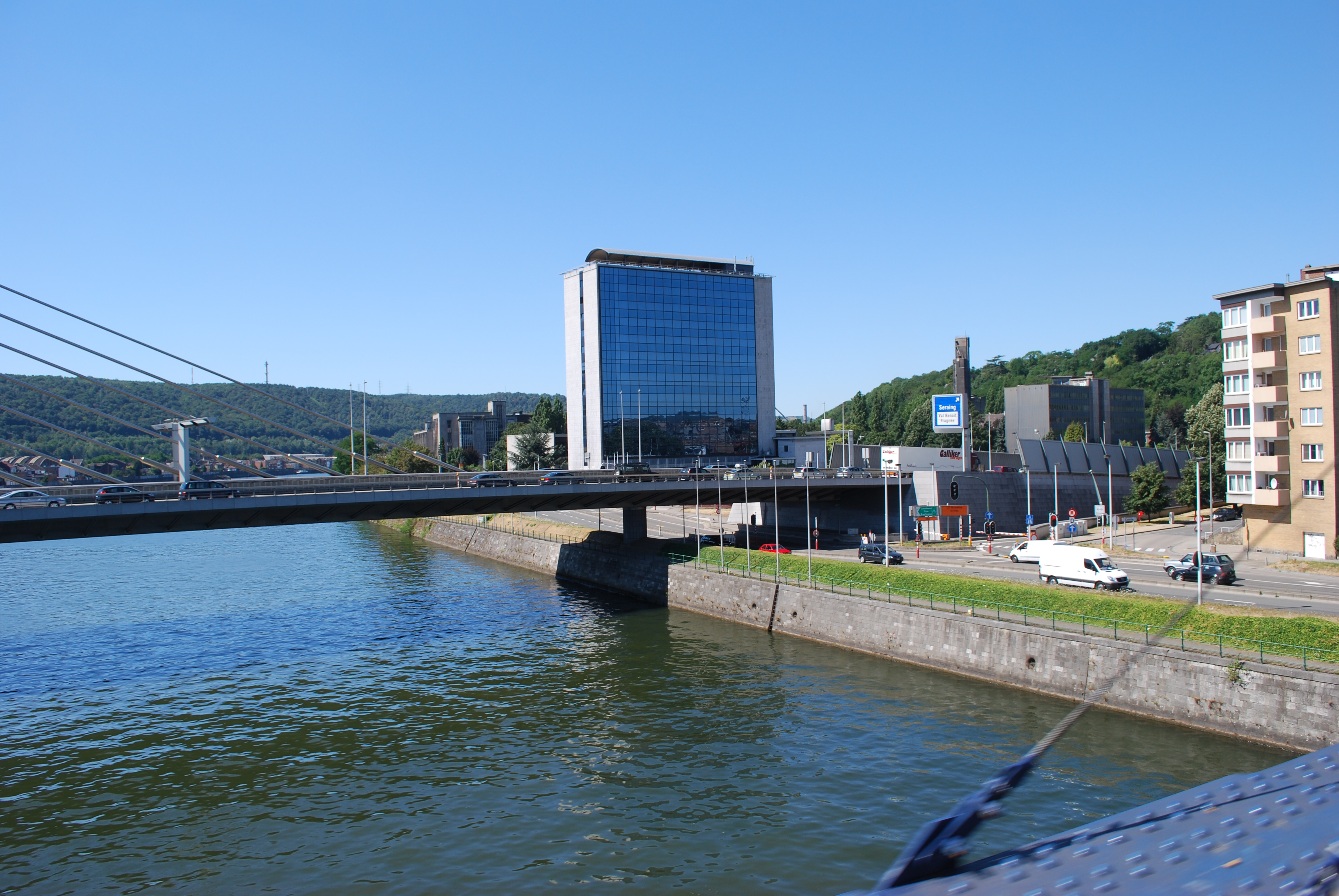 Le quai Banning et le pont de Liège sur la Meuse.